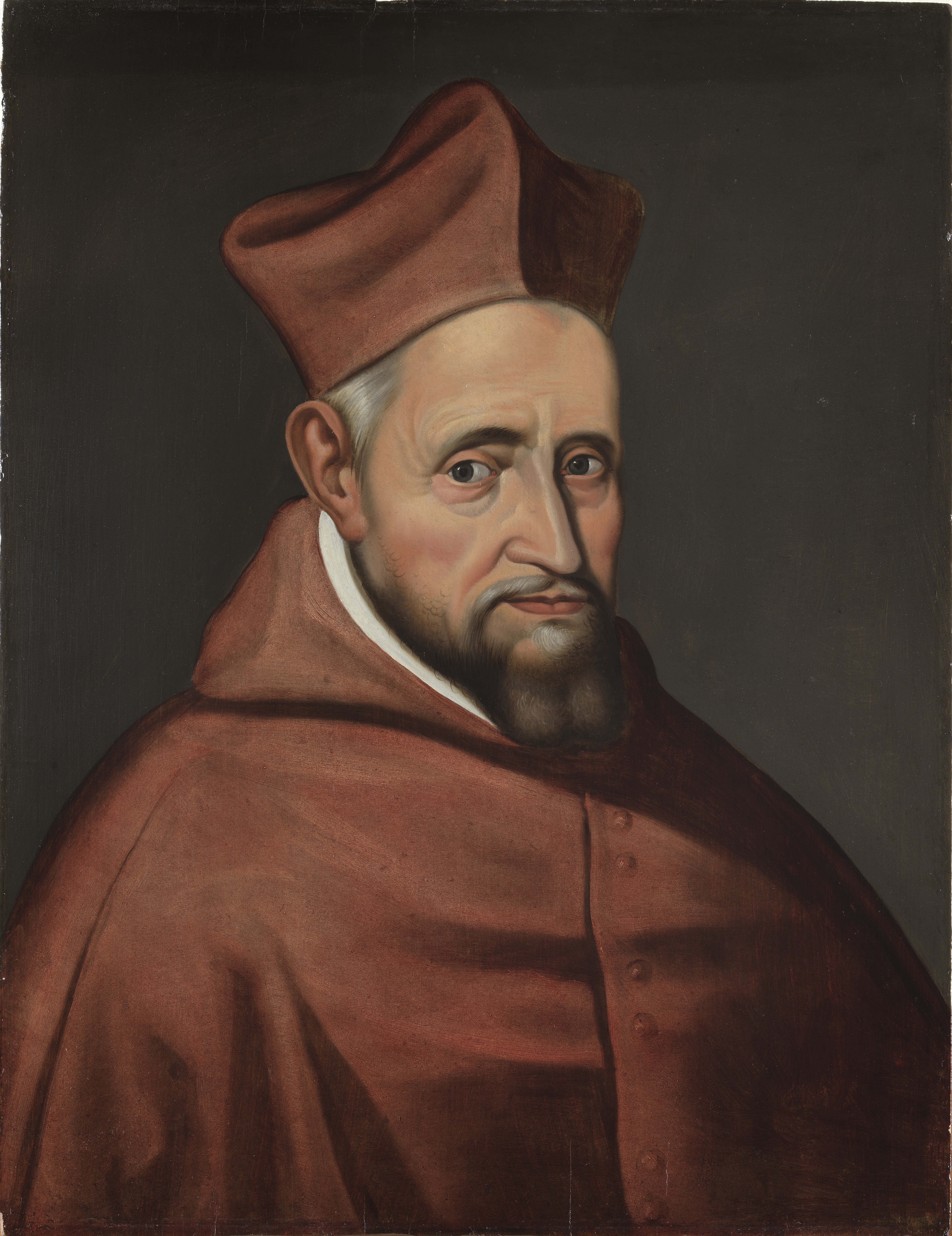 schilderij ( Museum Plantin-Moretus